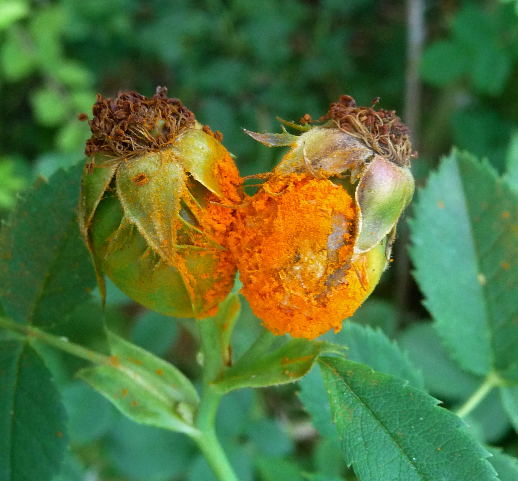 Rust fungus